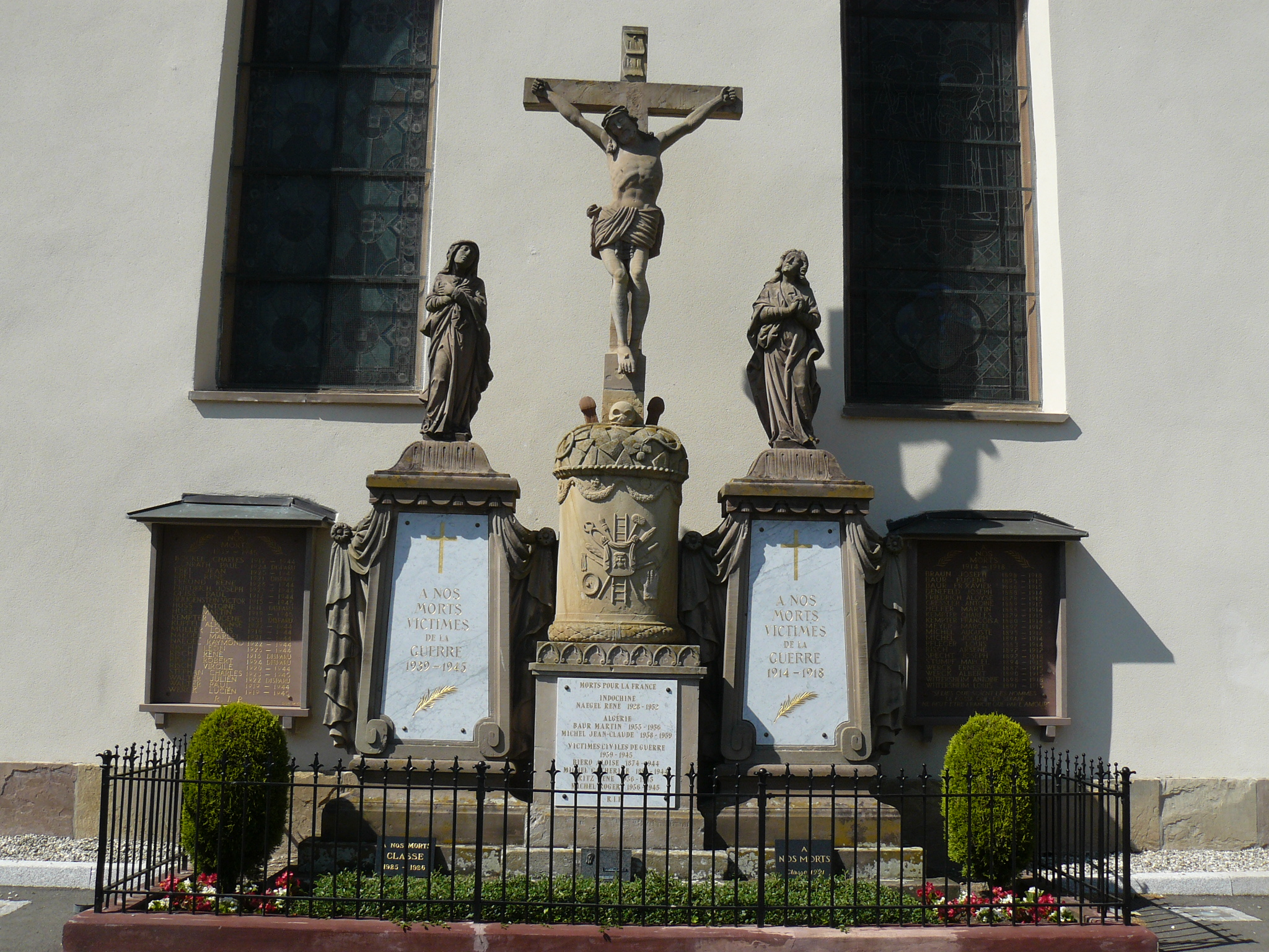 Calvaire (XVIII-XXe siècle)